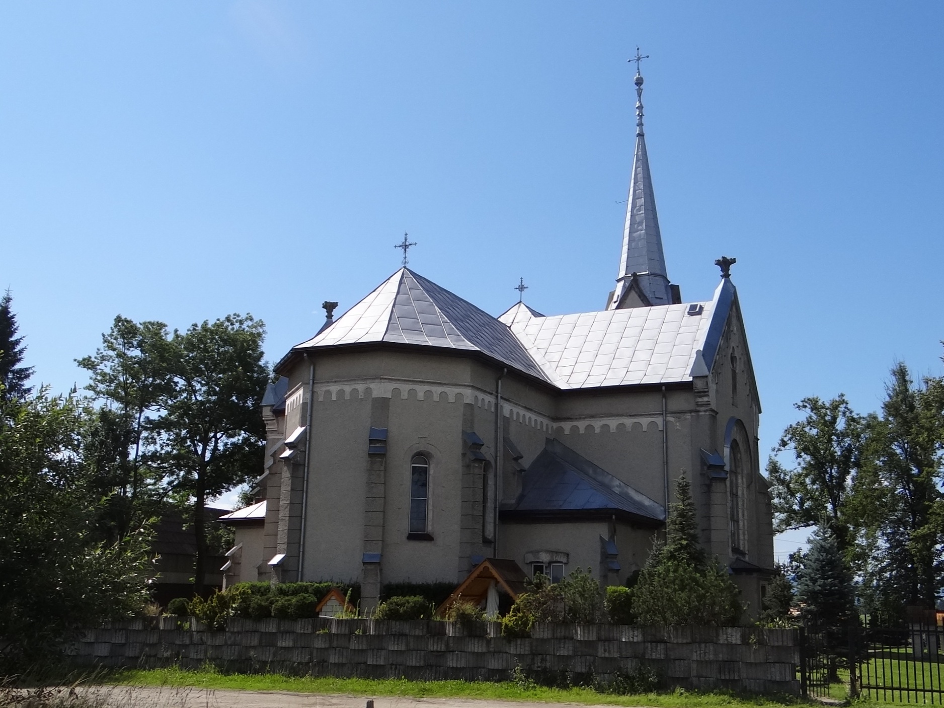 Kościół w miejscowości Chyżne